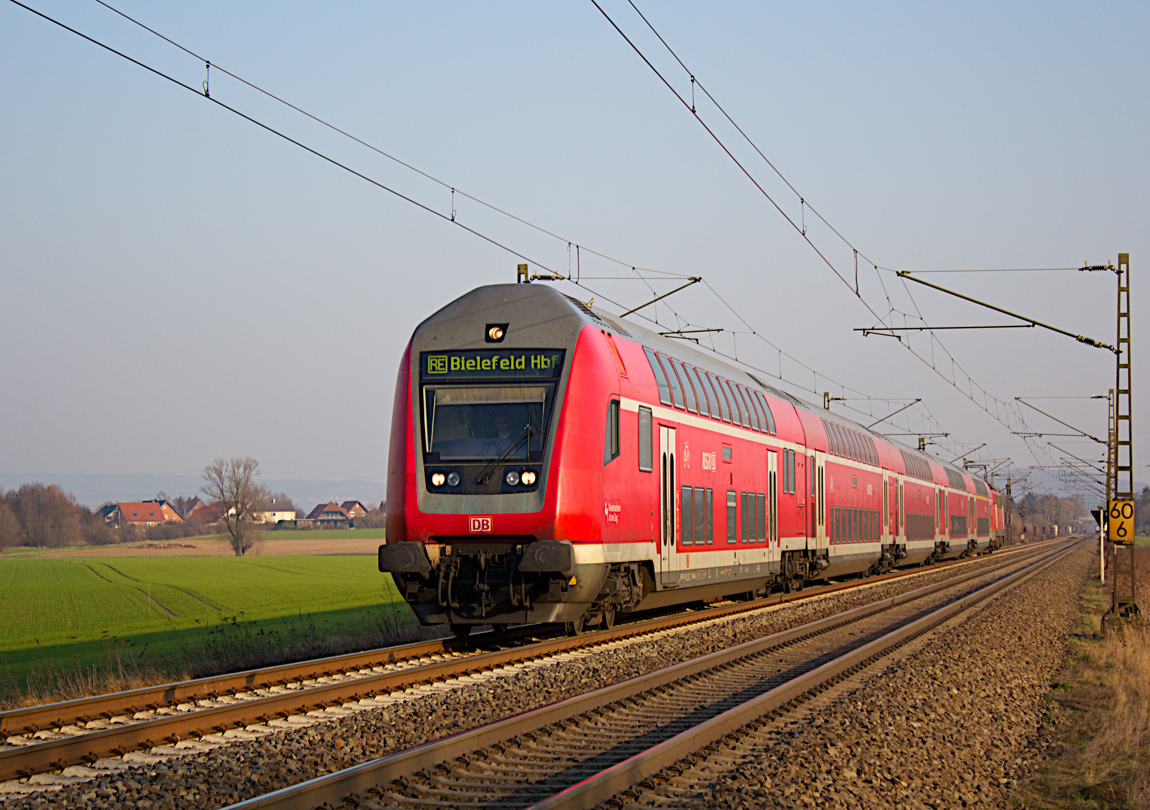 Regionalexpress kurz vor Minden.